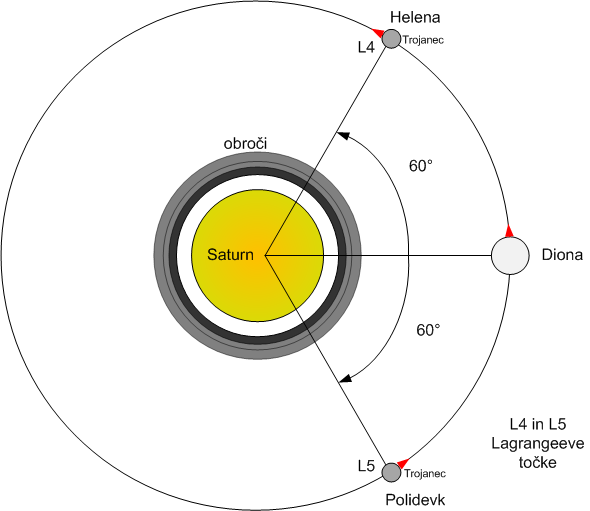 Sistem Saturnovih lun Tetida, Telesta in Kalipso. Razmerje razdalj ni realno.